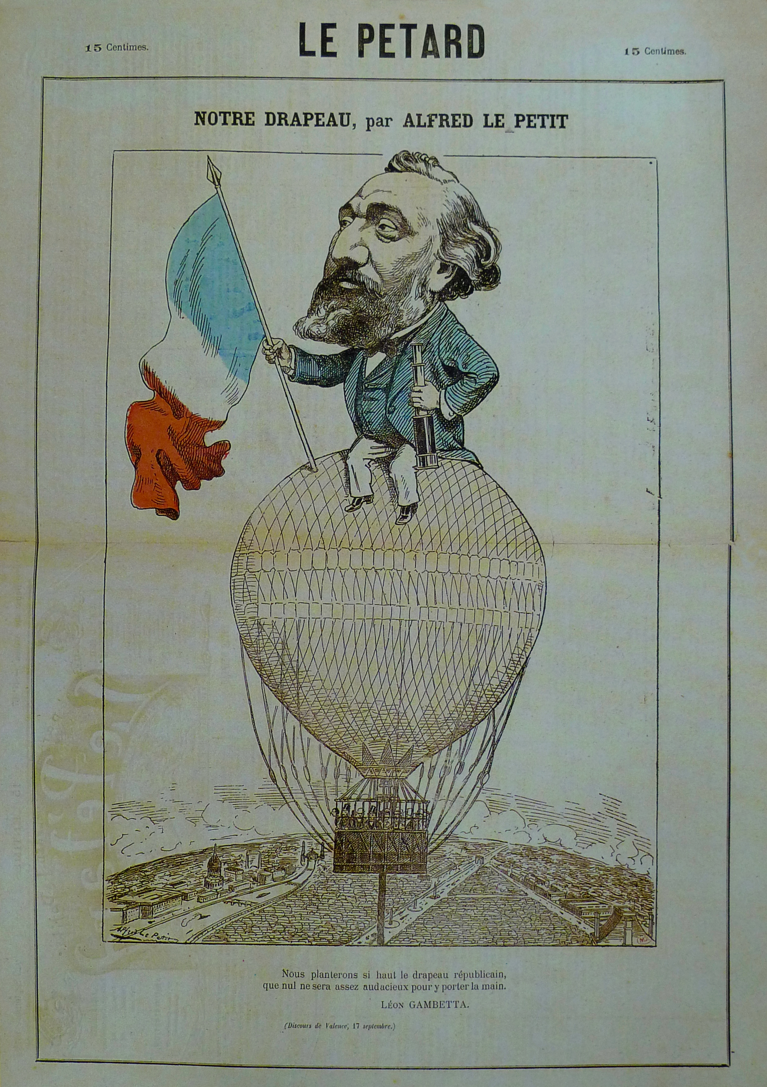 Journal satirique Le Pétard, vers 1877, caricature de Léon Gambetta par Alfred Le Petit.